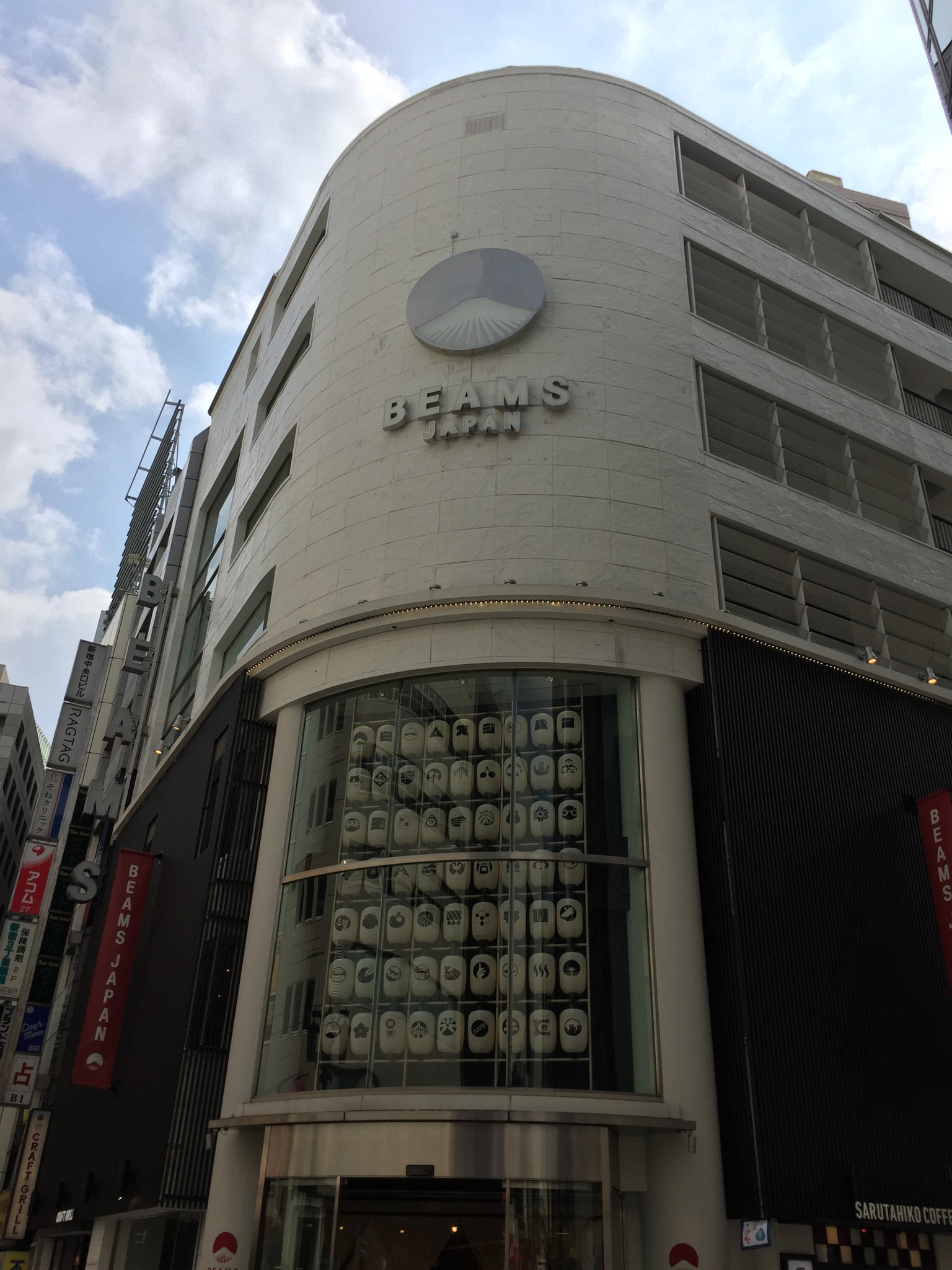 東京新宿 ビームス ジャパン BEAMS JAPAN